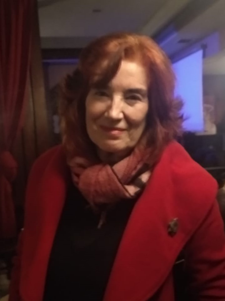 Fotografía de Luisa Abad